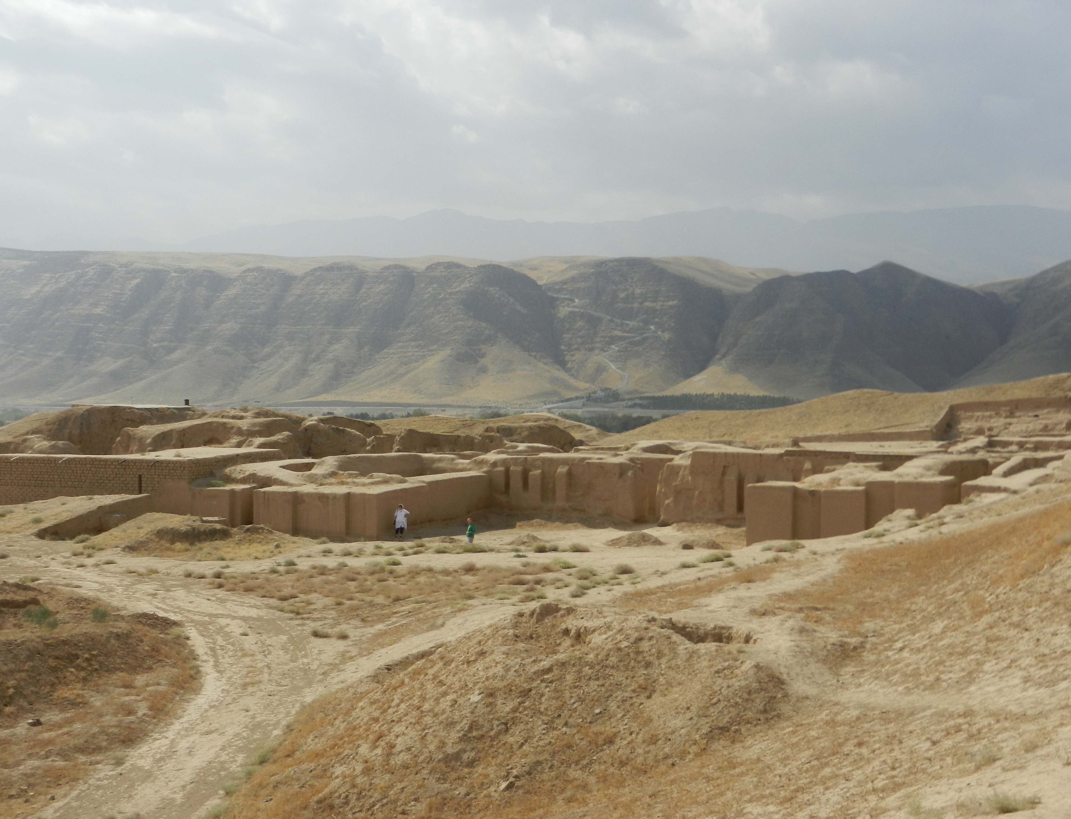 Pogled na mesto Nisa iz obrambnega nasipa